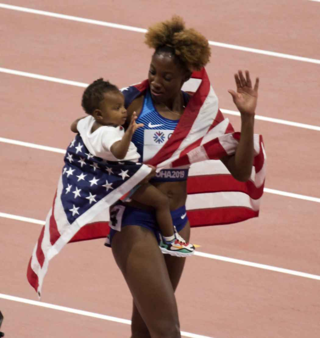 DOH90128 nia ali